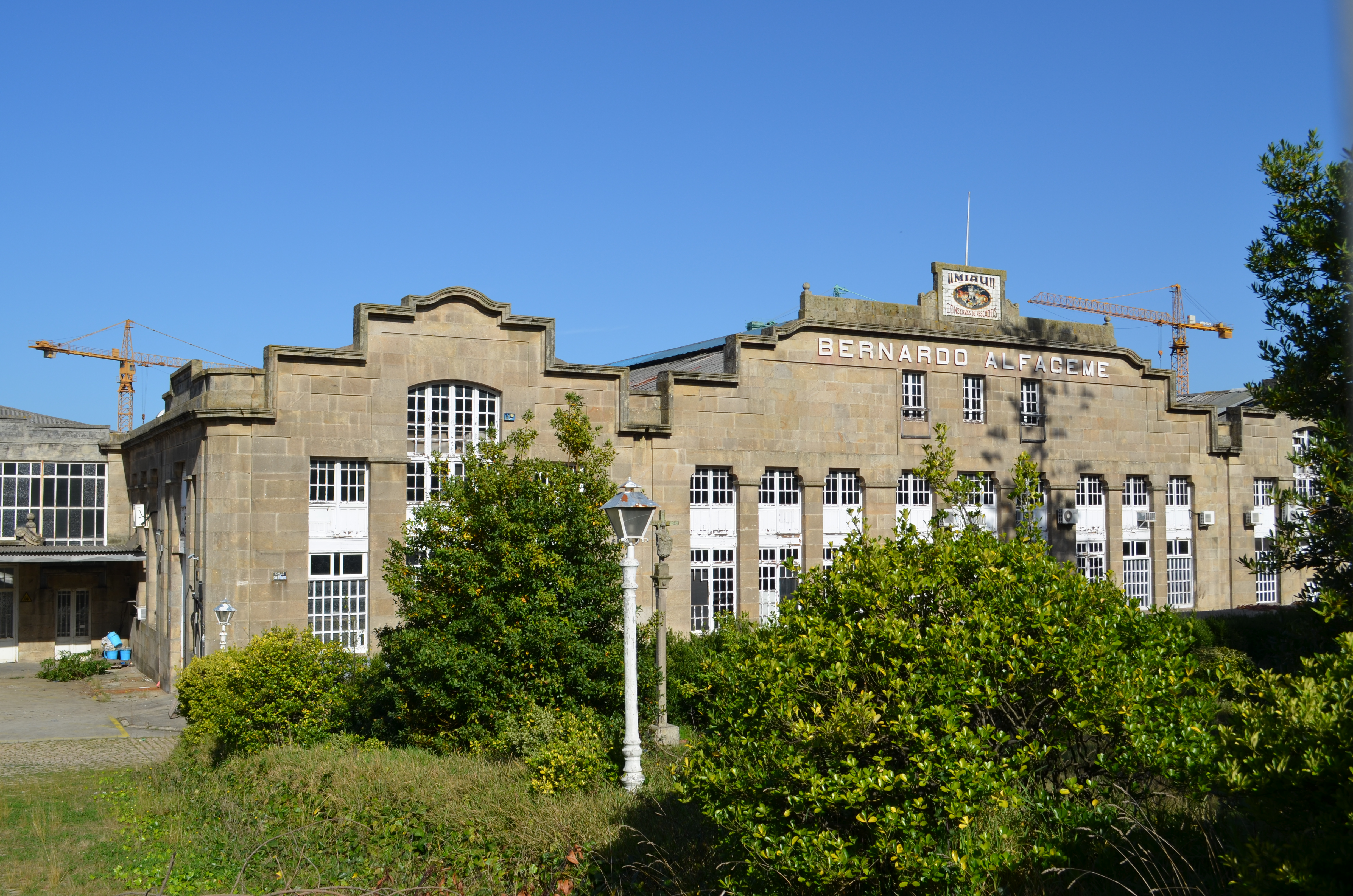 Miau_Bernardo_Alfageme_-_Calle_San_Bernardo_-_Vigo_-_Spain